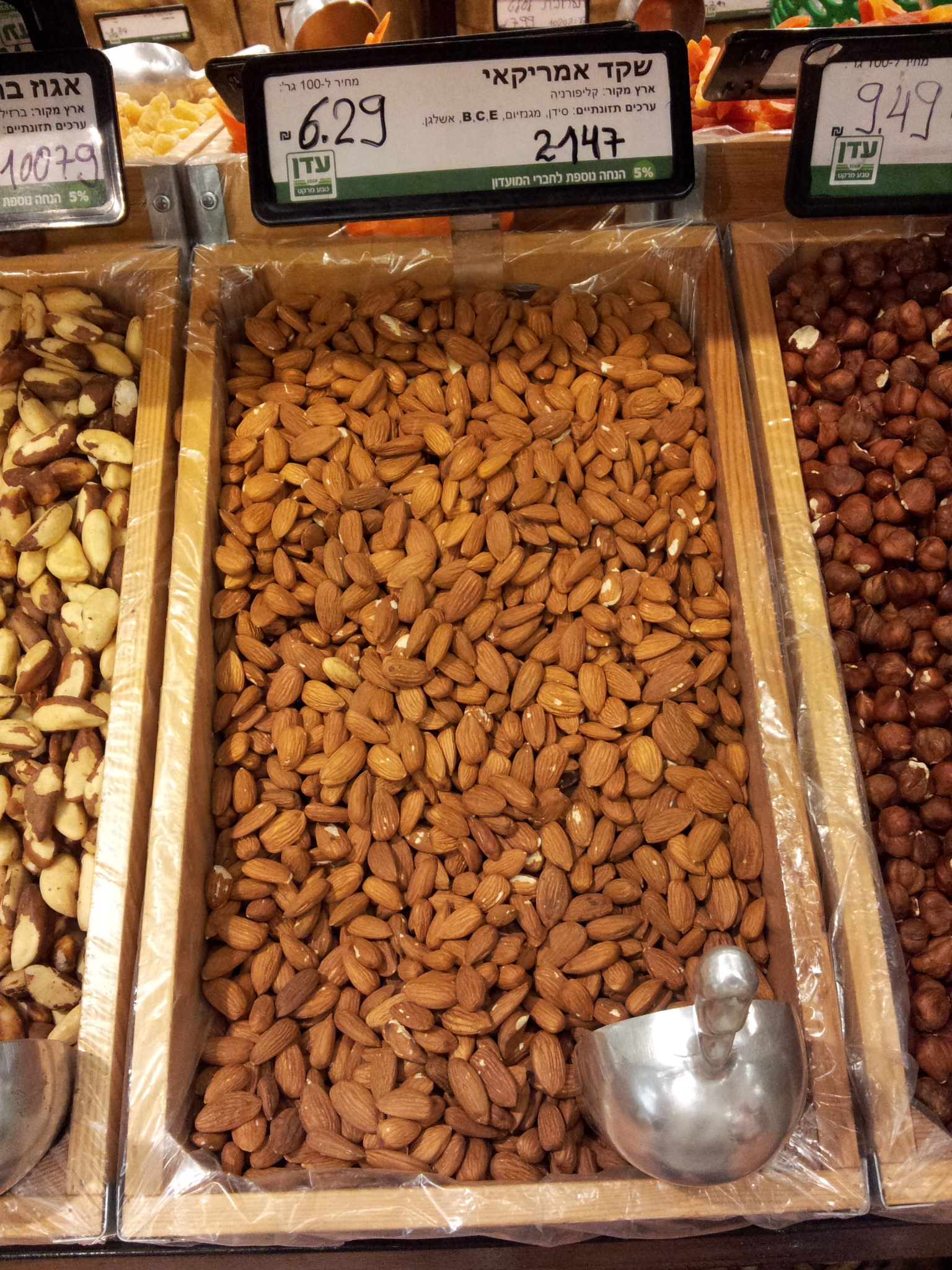 שקד "אמריקאי" במרכול בירושלים